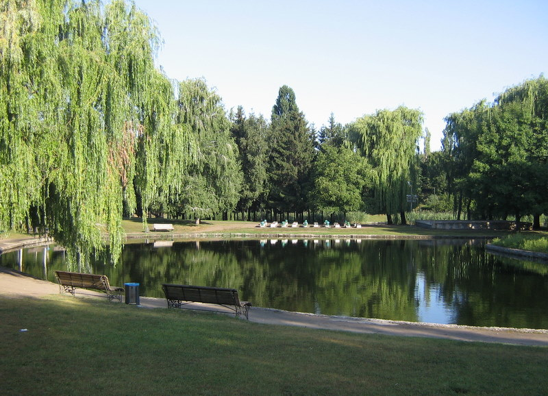 Парк Перемога в Черкасах